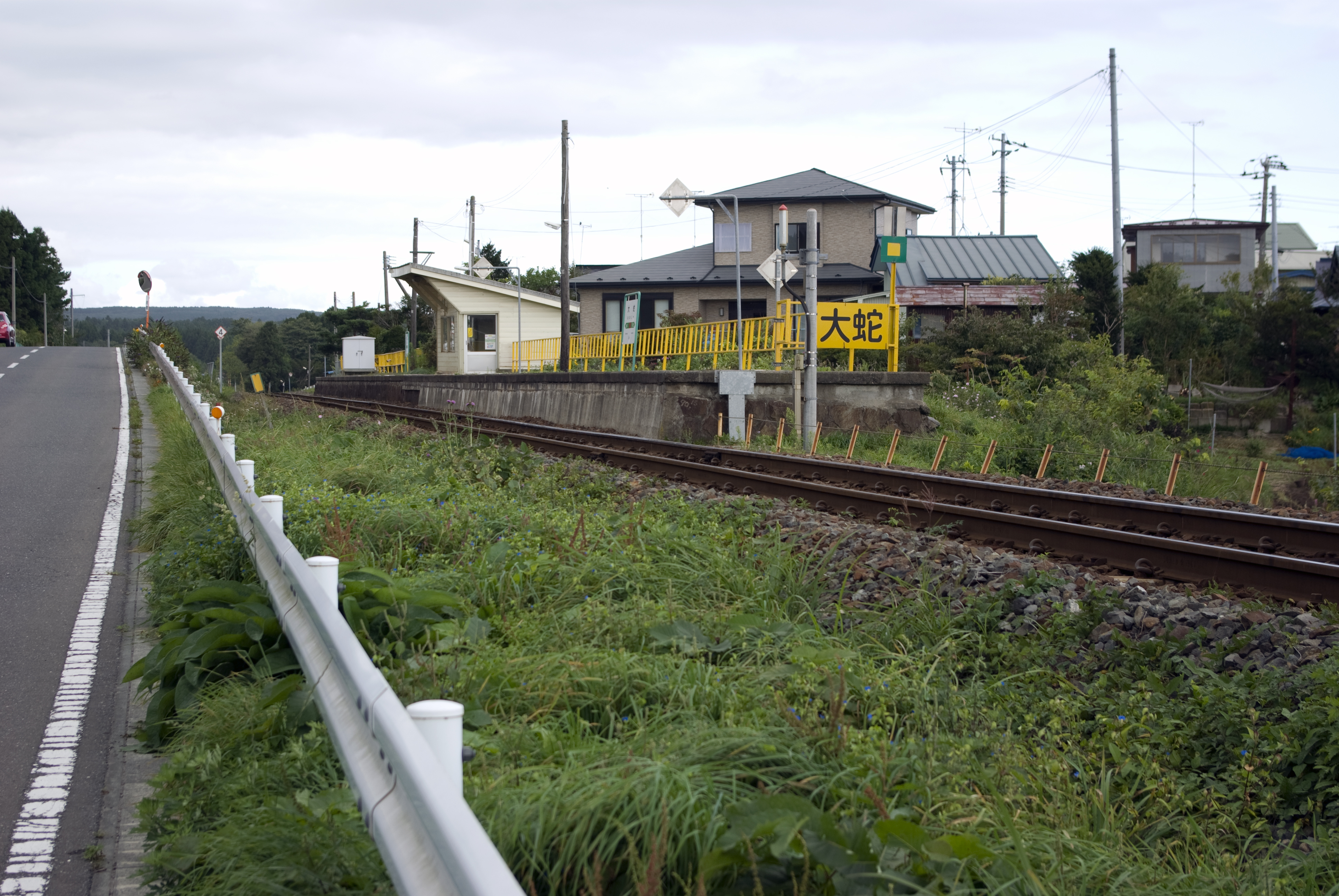 JR八戸線大蛇駅